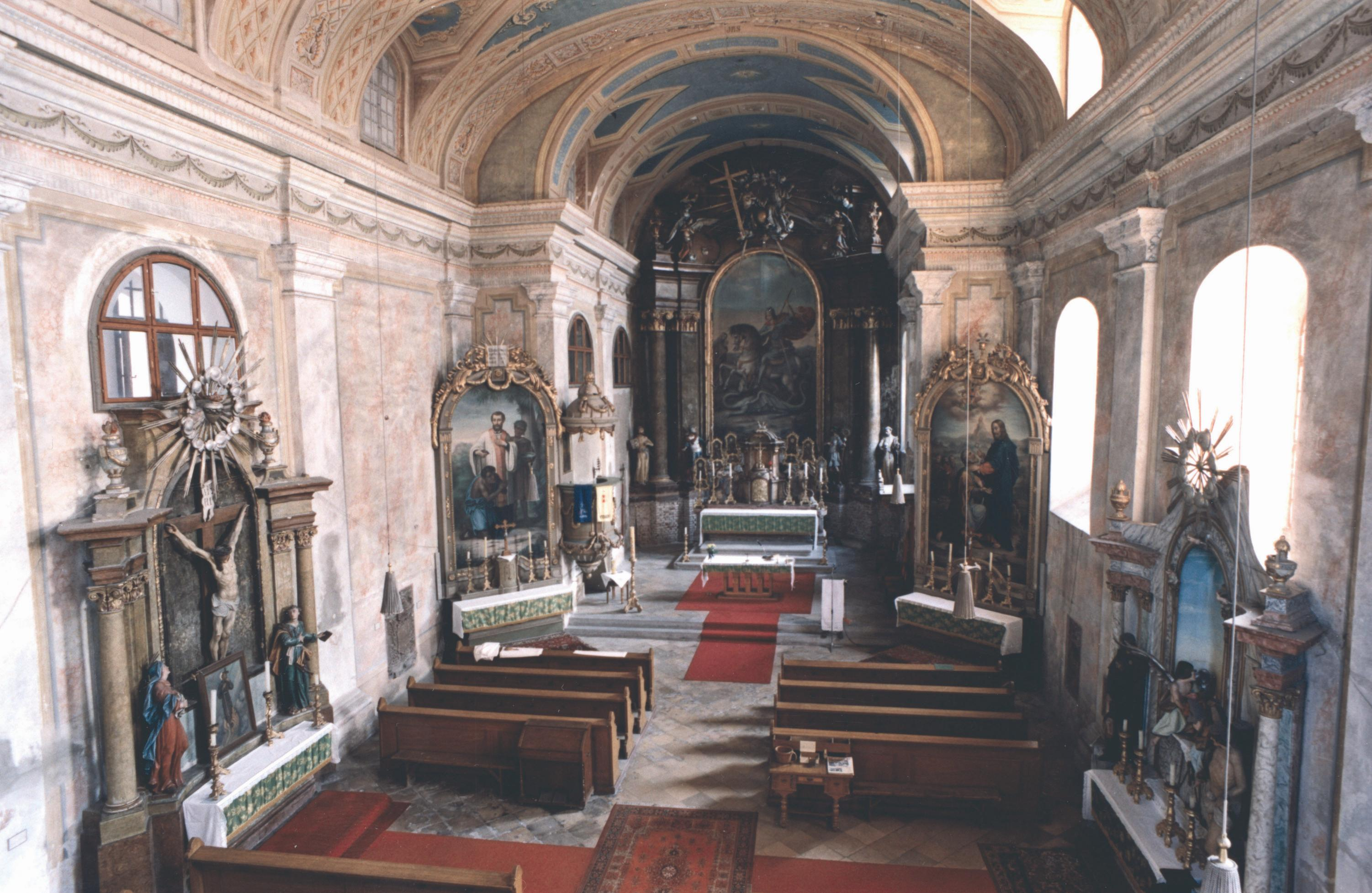 Unutrašnjost crkve sv. Jurja u Petrovaradinu